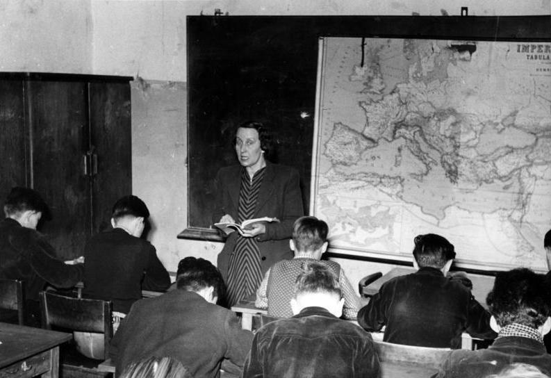 Pestalozzi-Schule in Idstein/Taunus